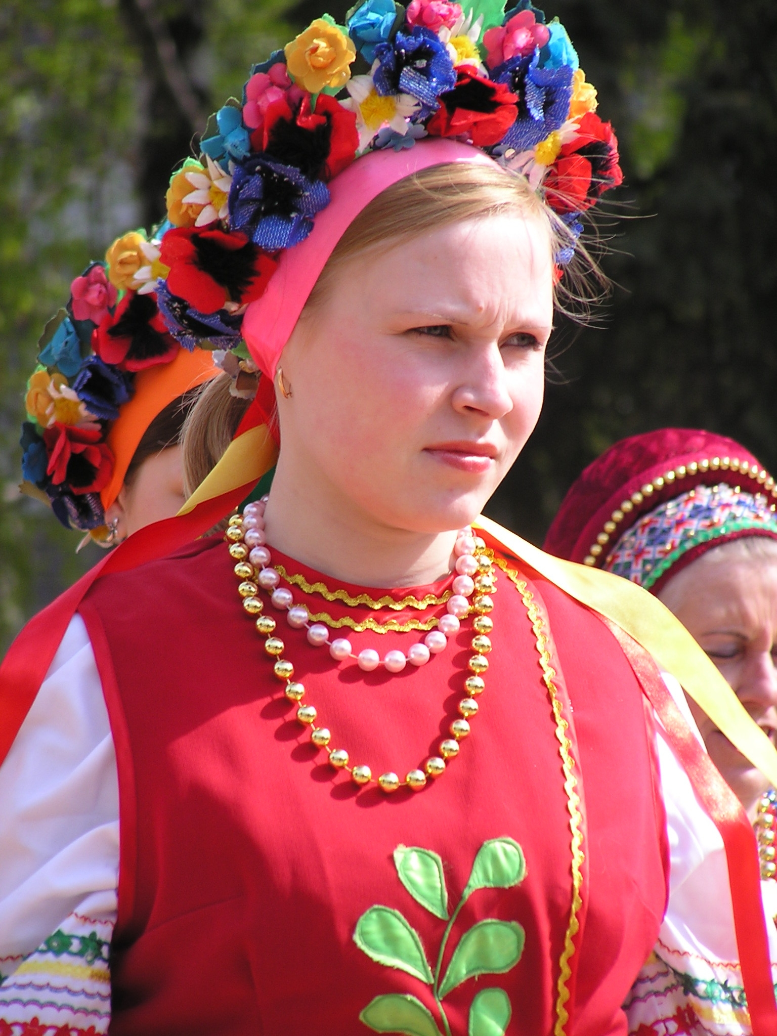 Донецк. Православный фестиваль "Пасха красная".